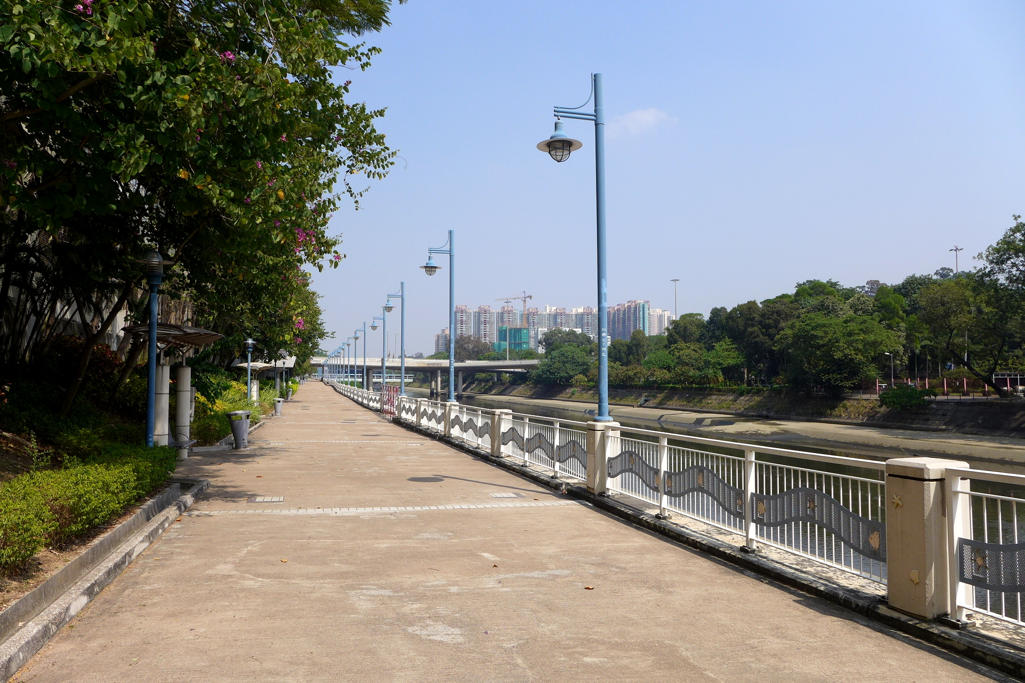 Tuen Mun Riverside Park